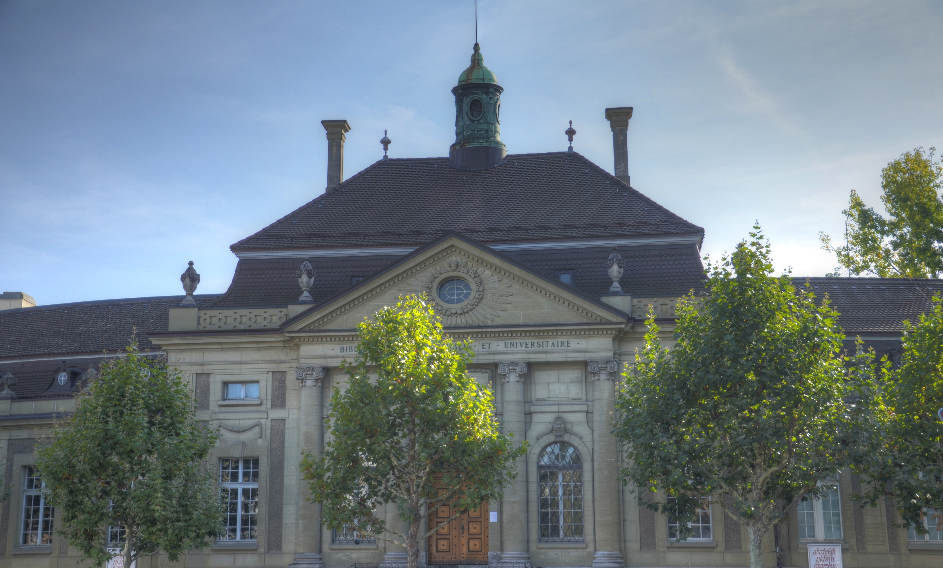 Kantons- und Universitätsbibliothek Freiburg. Rue Joseph-Piller 2, 1700 Fribourg